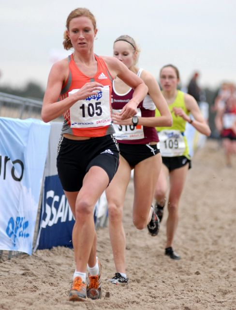 Merel de Knegt during Silvestercross 2007